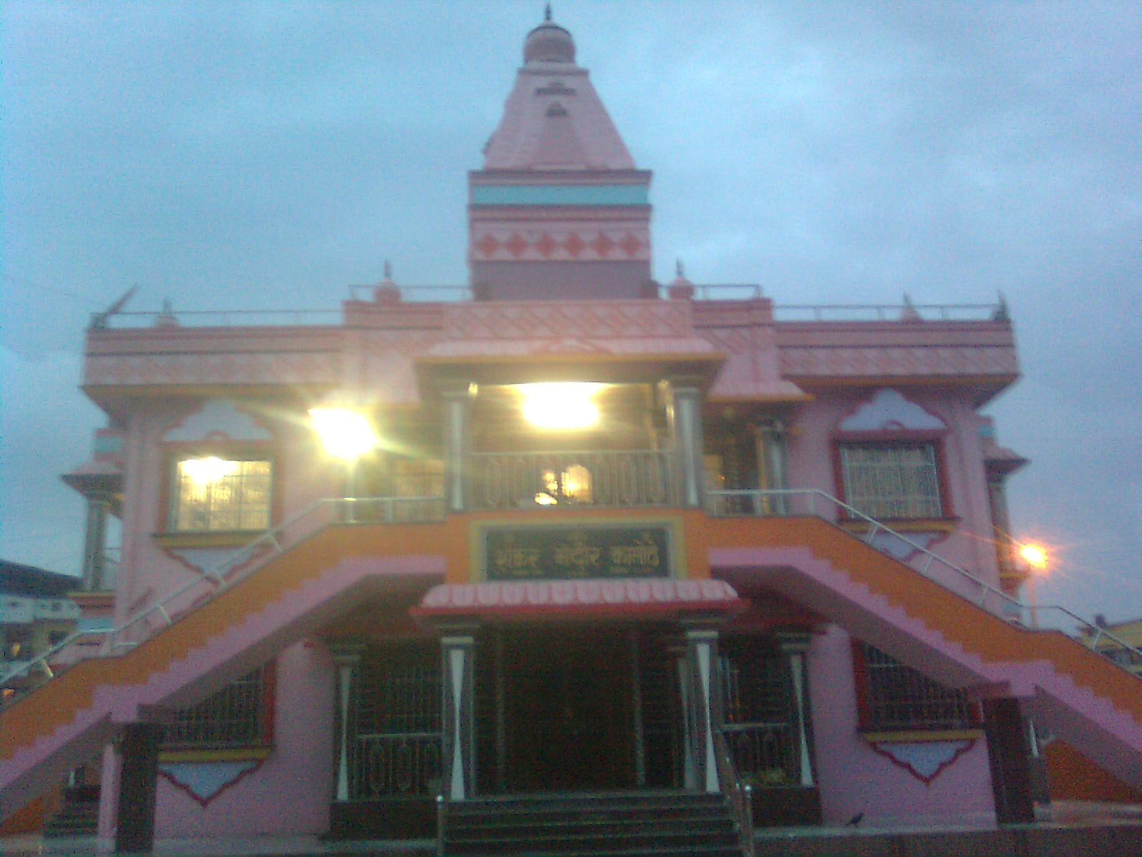 कामोठे